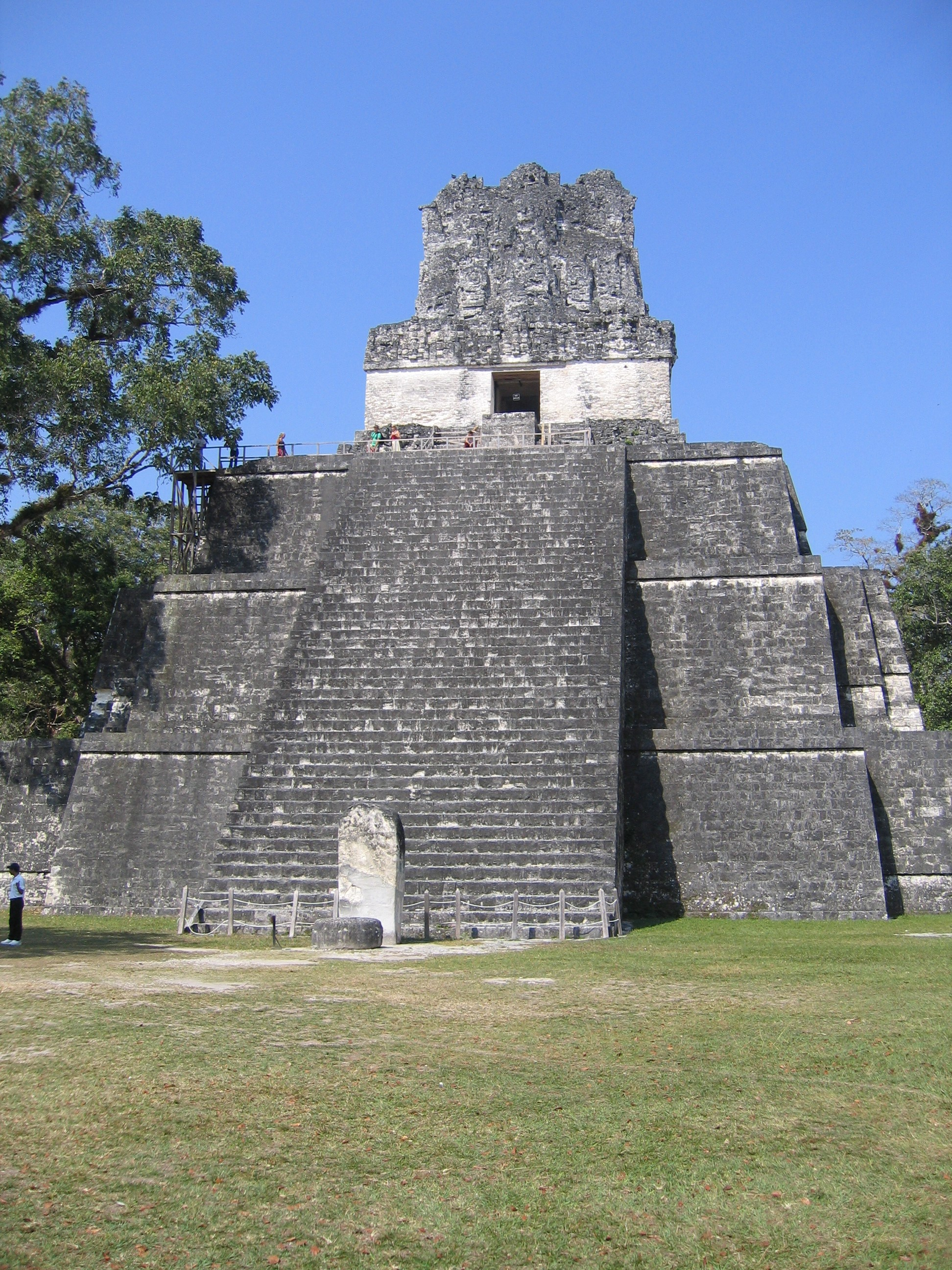 From the mayan site Tikal Tikal is in Guatemala.